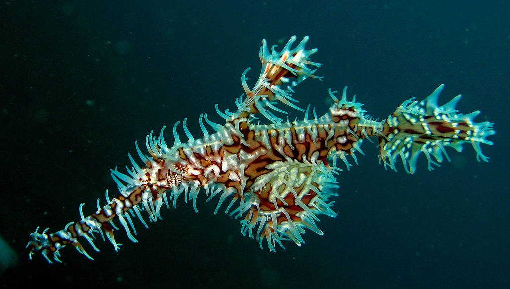 Ornate Ghostpipefish (Solenostomus paradoxus)